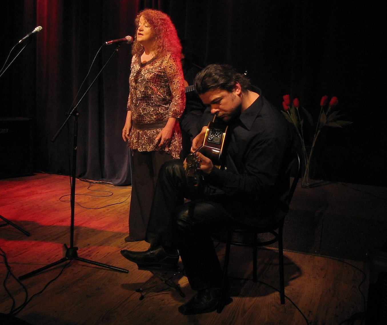 Krystyna Świątecka w czasie koncertu zespołu Czerwony Tulipan w Zielonej Górze. Maj 2006